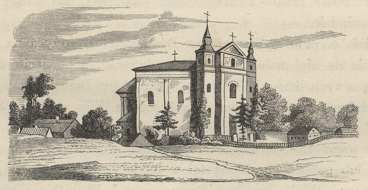 Беларуская (тарашкевіца): Быстрыца (Bystryca). Касьцёл Узвышэньня Сьвятога Крыжа